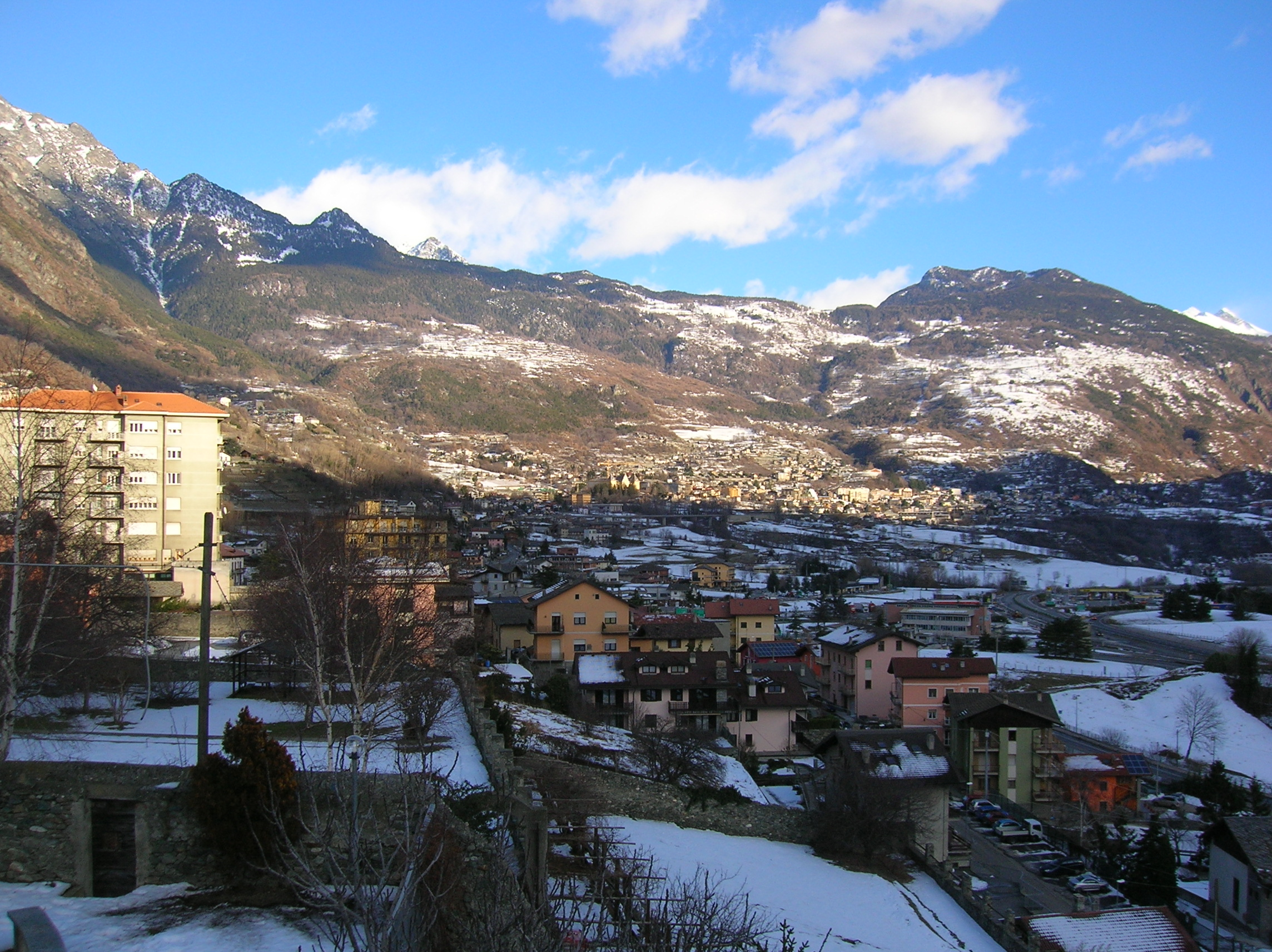 Châtillon e Saint-Vincent visti da un belvedere di Châtillon. Si noti che i due paesi si fondono l'uno con l'altro. Lungo la linea dell'ombra l'edificio giallo che spicca con un tetto imponente è il famoso Grand Hotel Billia, che si trova accanto al Casinò di Saint-Vincent. Valle d'Aosta, Italia.